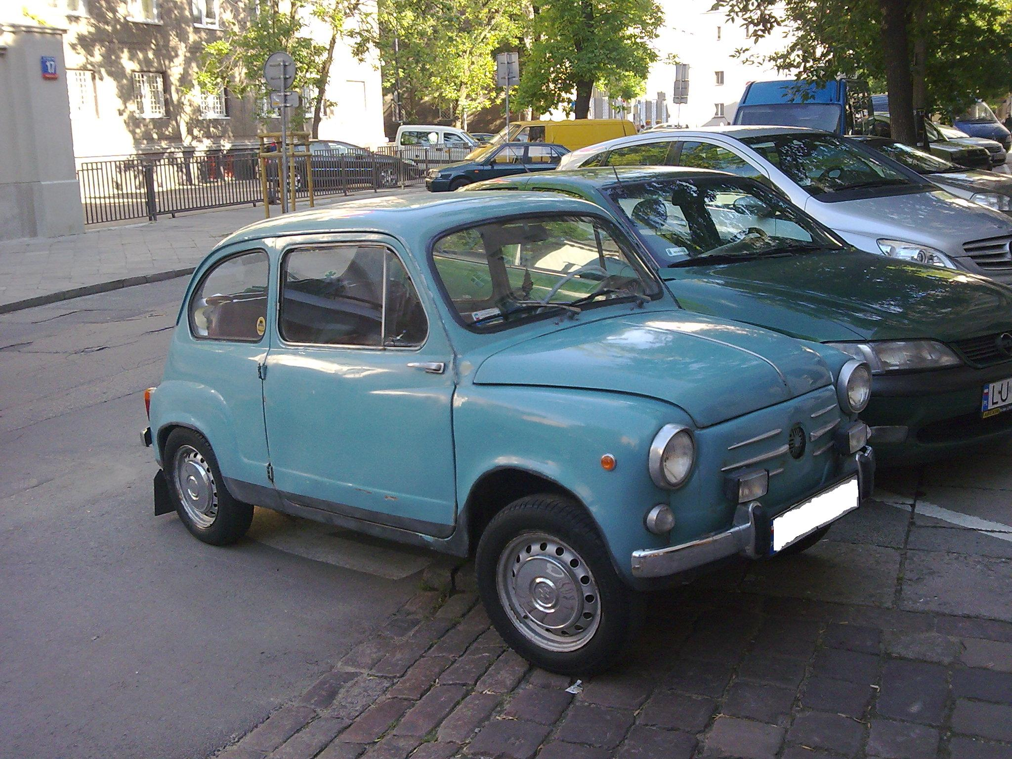 Zastava 750 w Polsce.